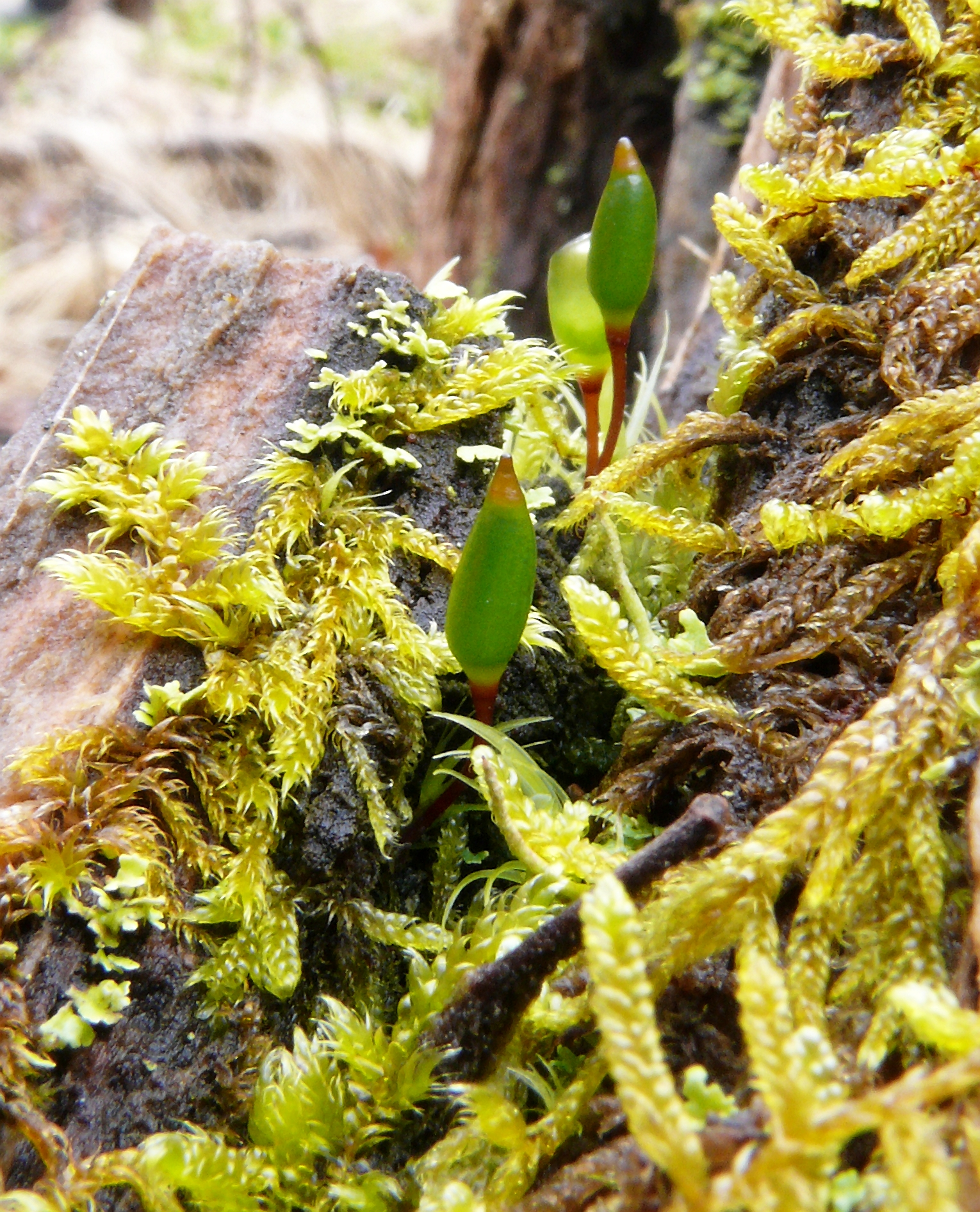 Buxbaumia viridis, Schwäbisch-Fränkische Waldberge, Germany